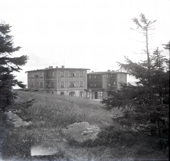 Petrova bouda (Peterbaude) v Krkonoších